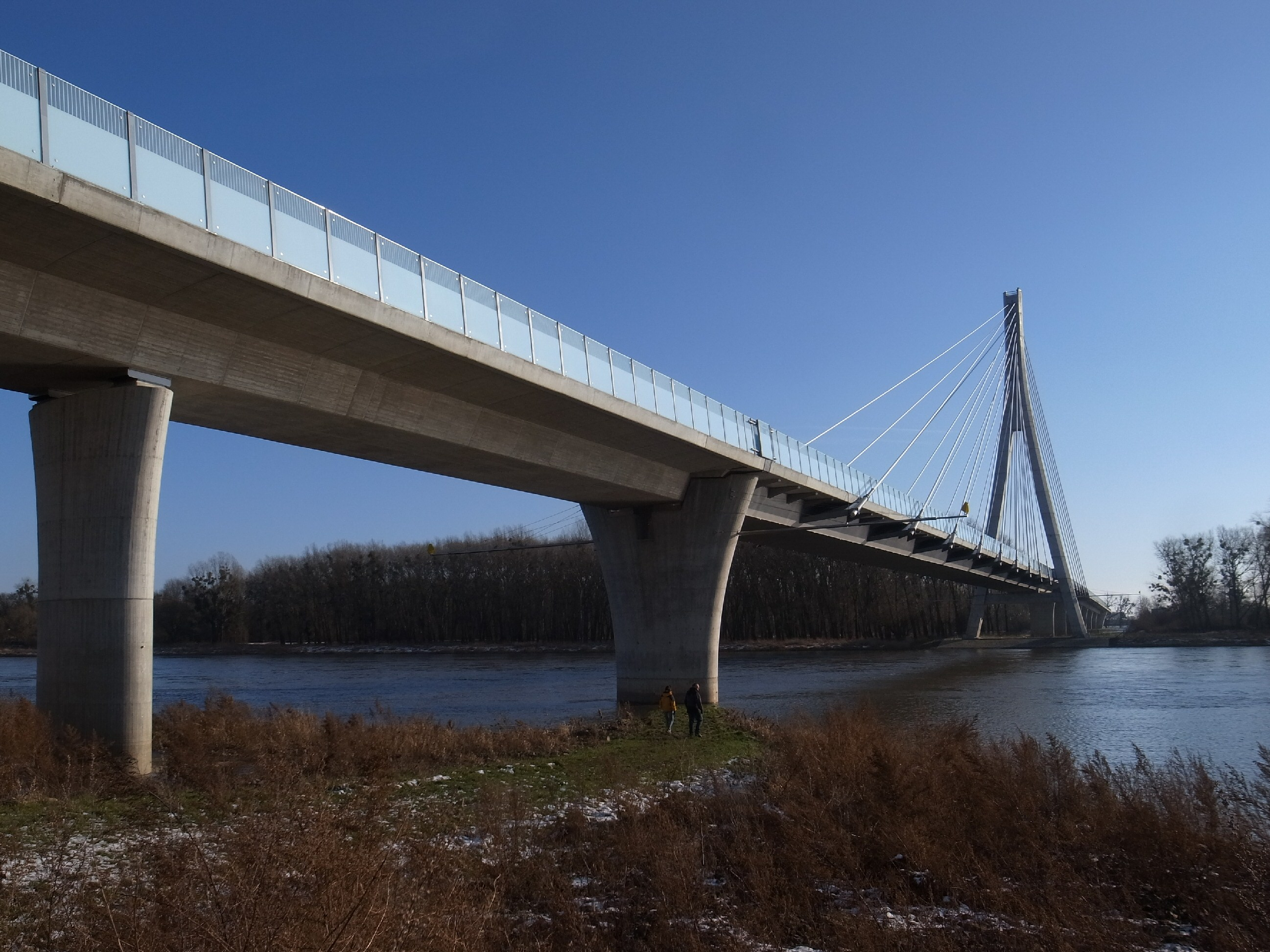 Schönebecker Elbauenbrücke